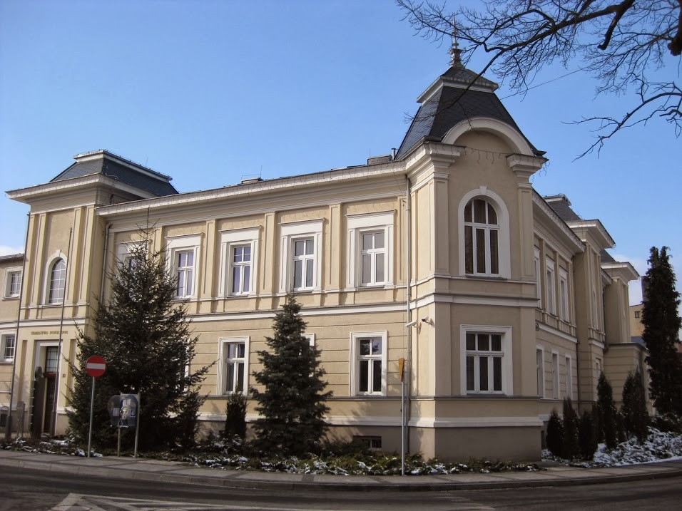 Września, ul. Chopina 10 - budynek starostwa powiatowego.